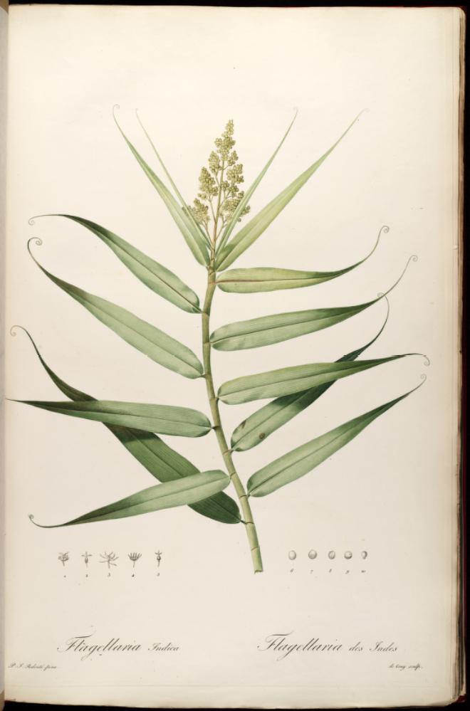 Illustration of Flagellaria indica